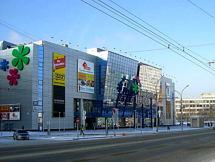 Новосибирск. ТРЦ "Ройял Парк"